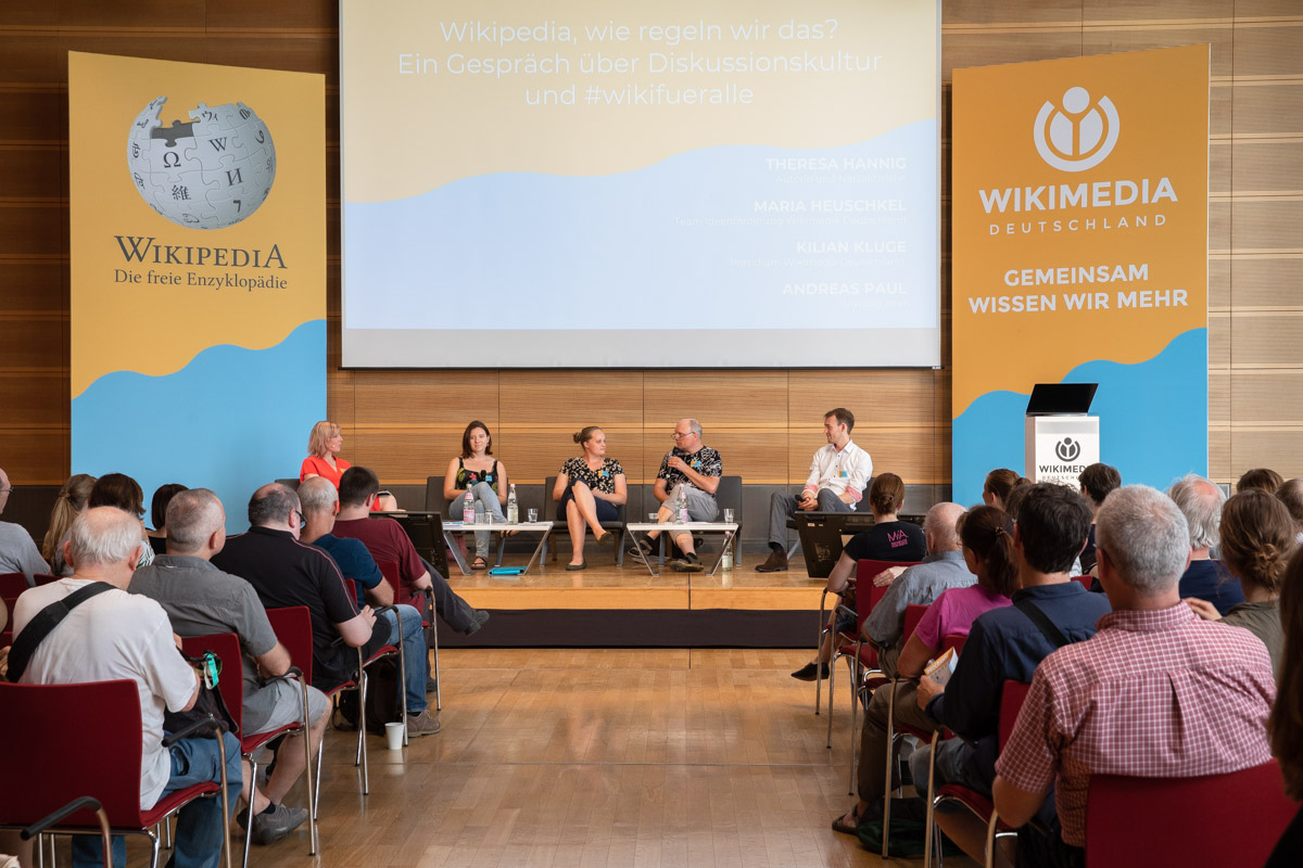 Diskussionsrunde "Wikipedia, wie regeln wir das? Ein Gespräch über Diskussionskultur und #wikifueralle" am Tag des Freien Wissens von Wikimedia Deutschland